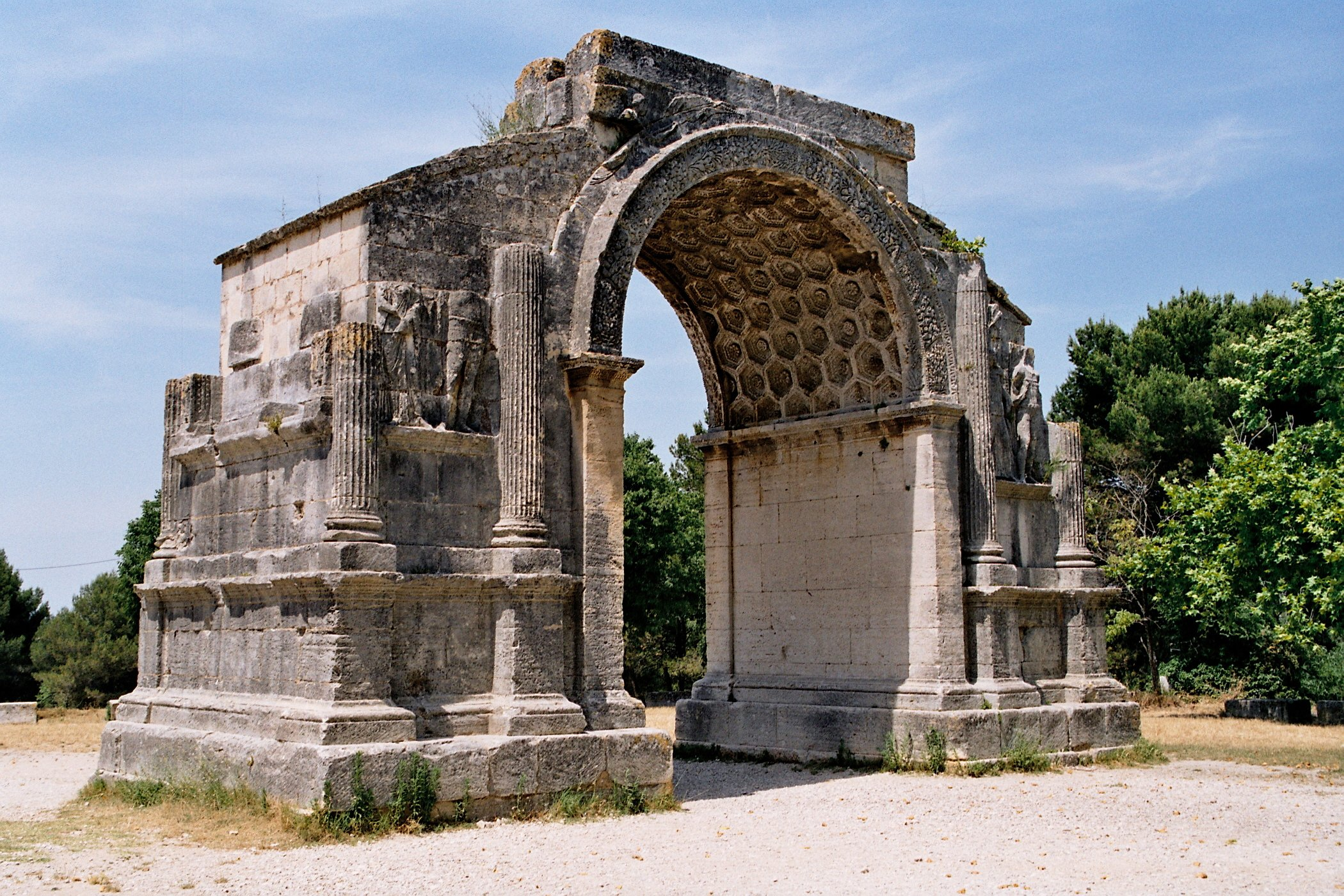 Arc de triomphe de Glanum à Saint-Rémy-de-Provence, dans les Bouches-du-Rhône (France)